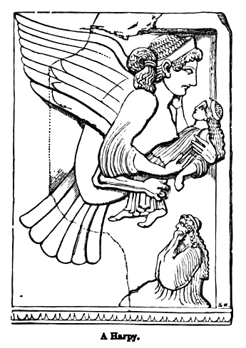 A Harpy.